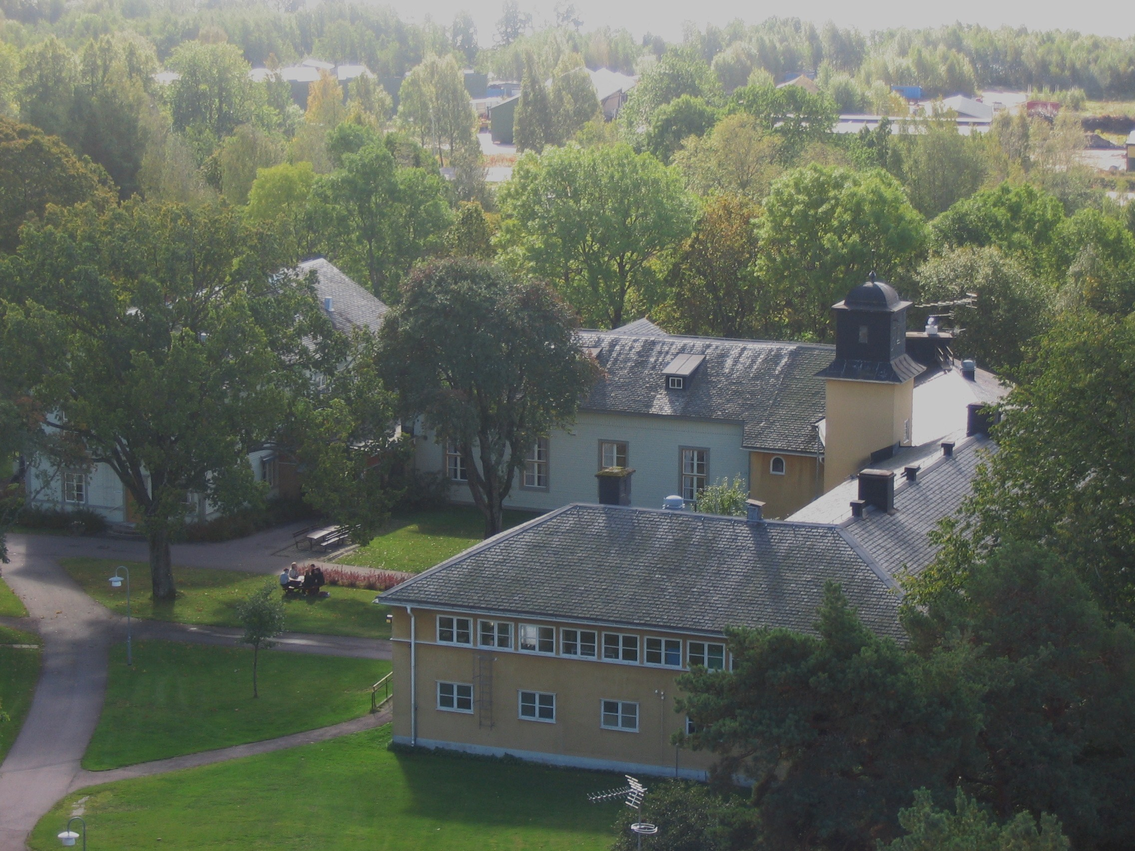 Molkoms folkhögskola sedd från vattentornet i Molkom